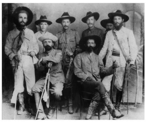 Algunos gochos que acompañaron al General Cipriano Castro, después de la batalla de Tocuyito en 1899. Cipriano Castro, y su Compadre Juan Vicente Gómez, junto a los hombres que hacia pocas horas, habían librado la batalla de Tocuyito, la cual le abrió las puertas de Valencia. Esta gesta se libró entre el 14 y el 15 de septiembre de 1899, cerca del pueblo de Tocuyito. Cinco horas duró el combate. Más de 500 muertos generó el enfrentamiento, entre ellos Miguelón, uno de los mejores soldados de la Revolución Liberal Restauradora, el puente que tendió Castro para abrazar el poder central.